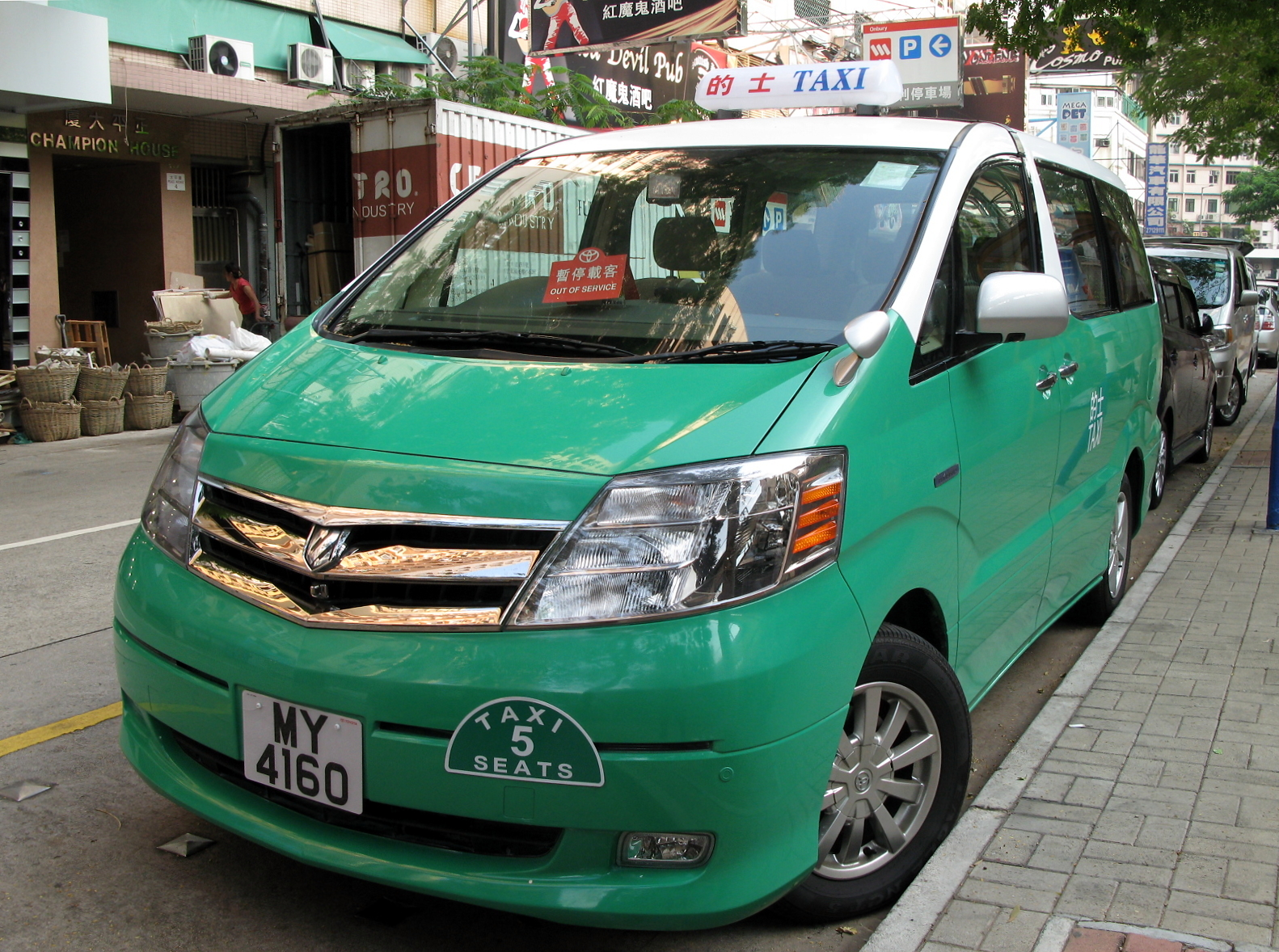 Toyota Alphard Taxi in Hong Kong